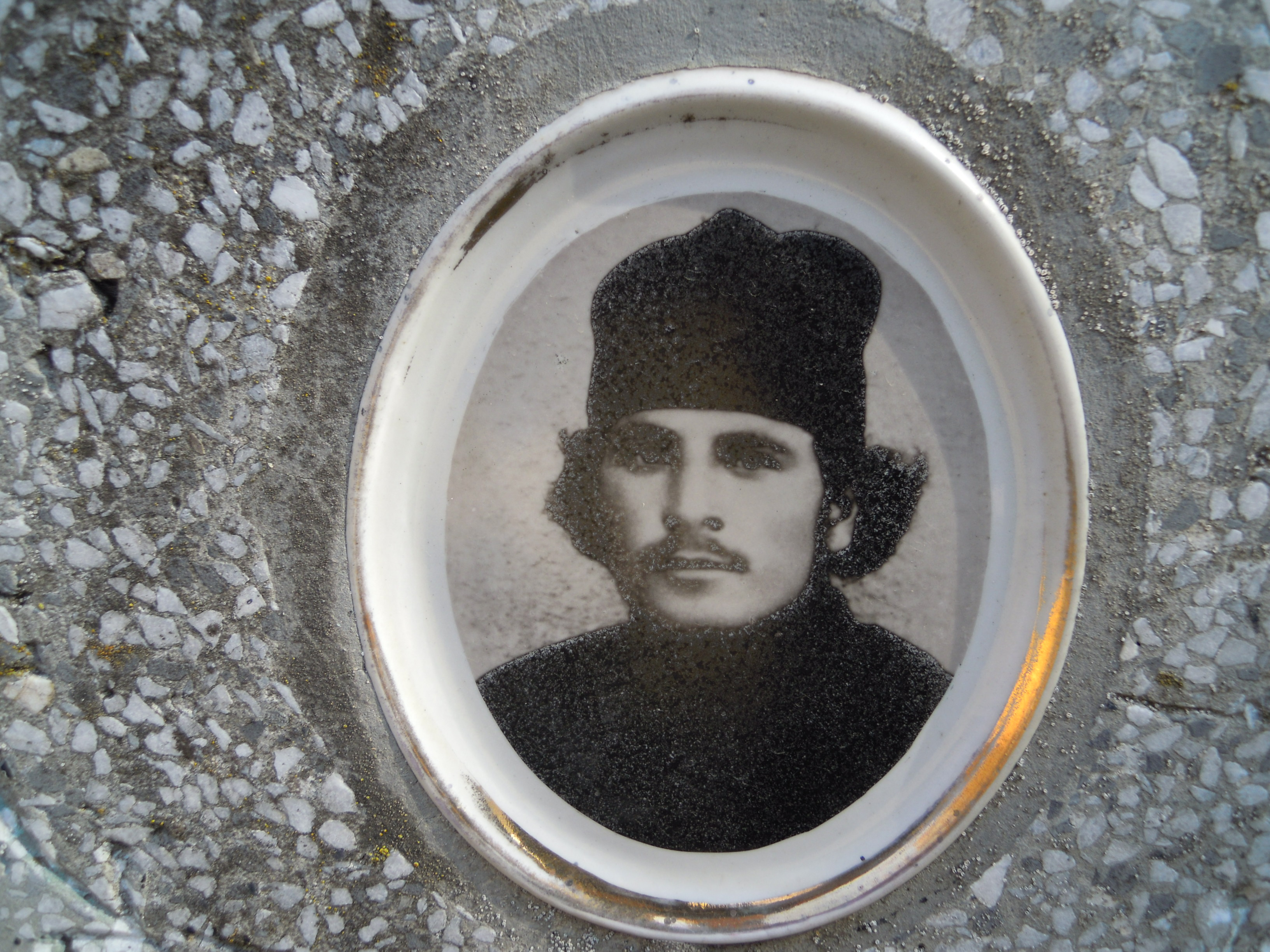 Српски (ћирилица): Витовнички јеромонах Сава Марковић. Имао је 33 године када су га убили витовнички комунисти.